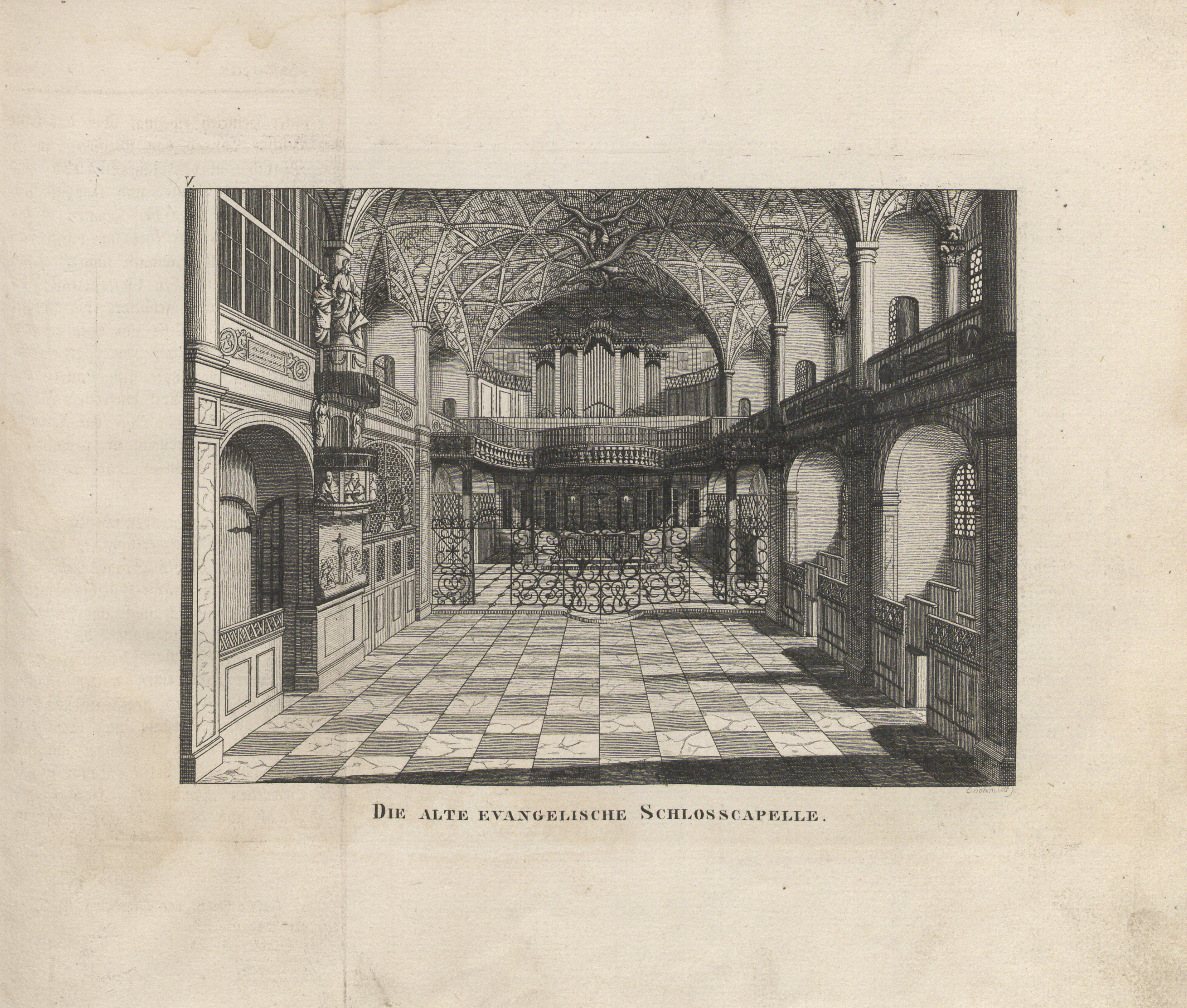 siehe Bildbeschreibung aus: Abbildungen von Dresdens alten und neuen Pracht-Gebäuden, Volks- und Hof-Festen. Untertitel: Kupferheft zur Chronik der Kgl. Sächs. Residenz-Stadt Dresden und des Sammlers für Geschichte und Alterthum, Kunst und Natur im Elbthale. Grimmer, Dresden 1835